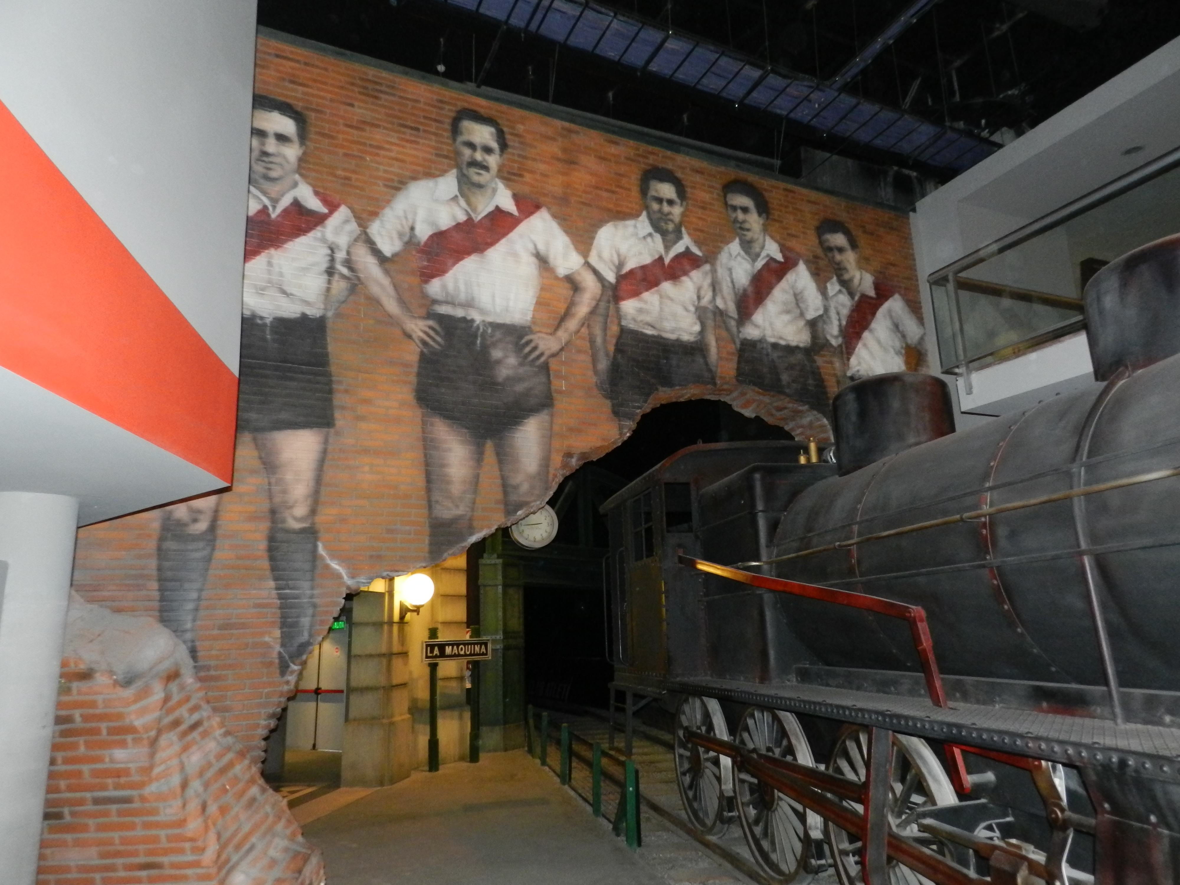 Buenos Aires / Tigre (Argentina)